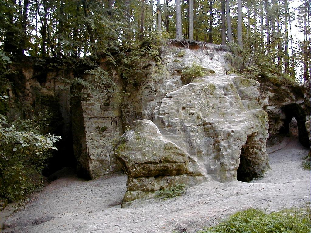 Liepas Lielā Ellīte 2001-09-02